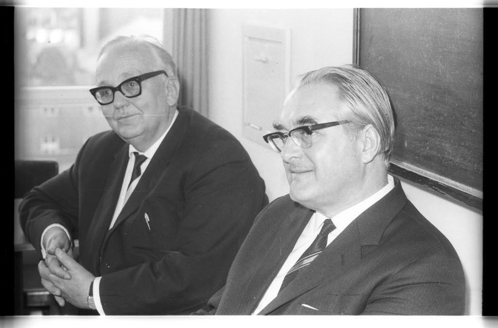 über "Religionsfreiheit und Volkskirche in Schweden heute" im Hörsaal der Theologischen Fakultät der Christian-Albrechts-Universität. Im Bild Prof. Dr. Gustaf Wingren (rechts) und Prof. Dr. Martin Redeker (links).